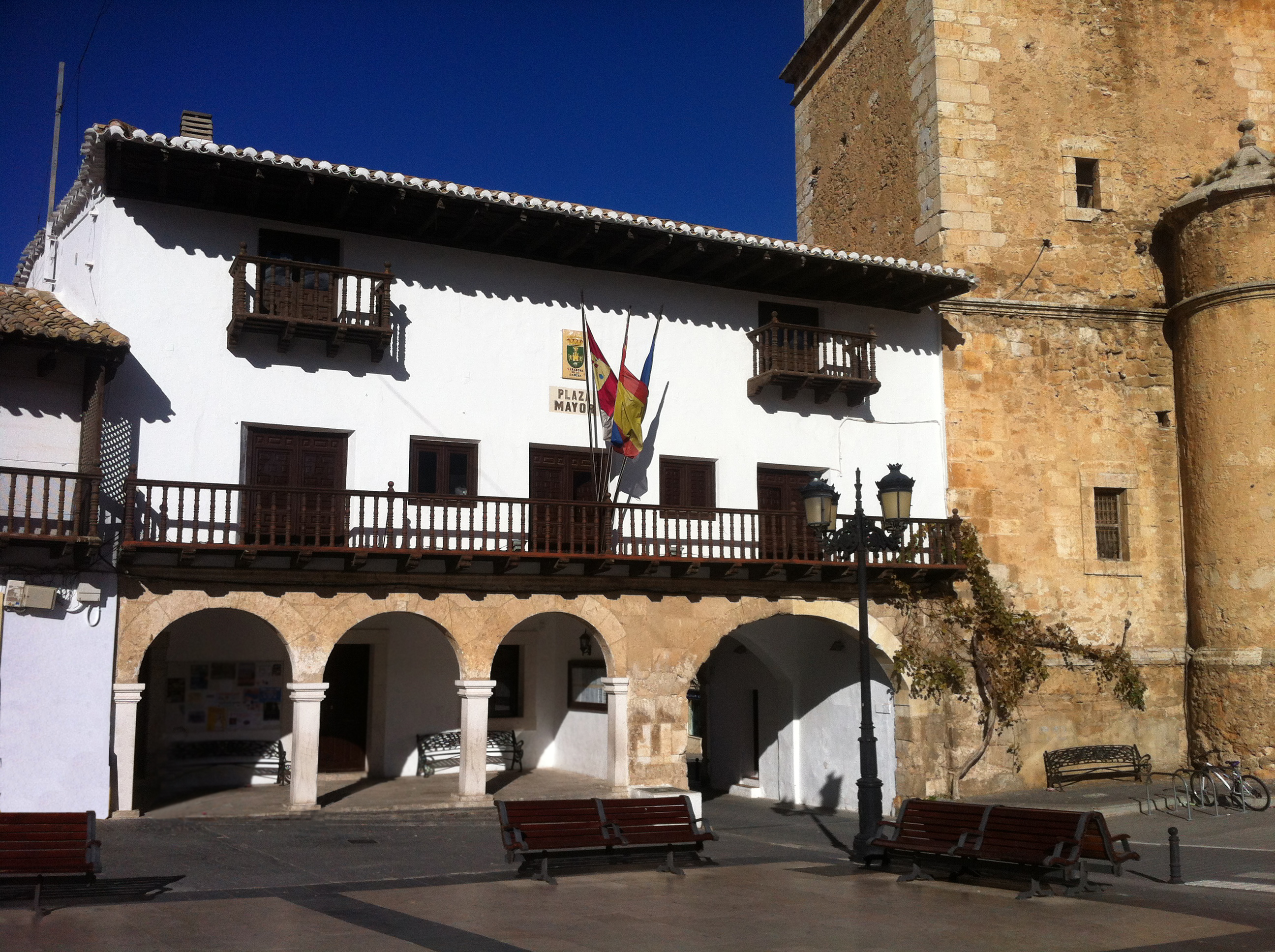 Fachada del ayuntamiento de Tarazona de la Mancha, situado en la Plaza Mayor.